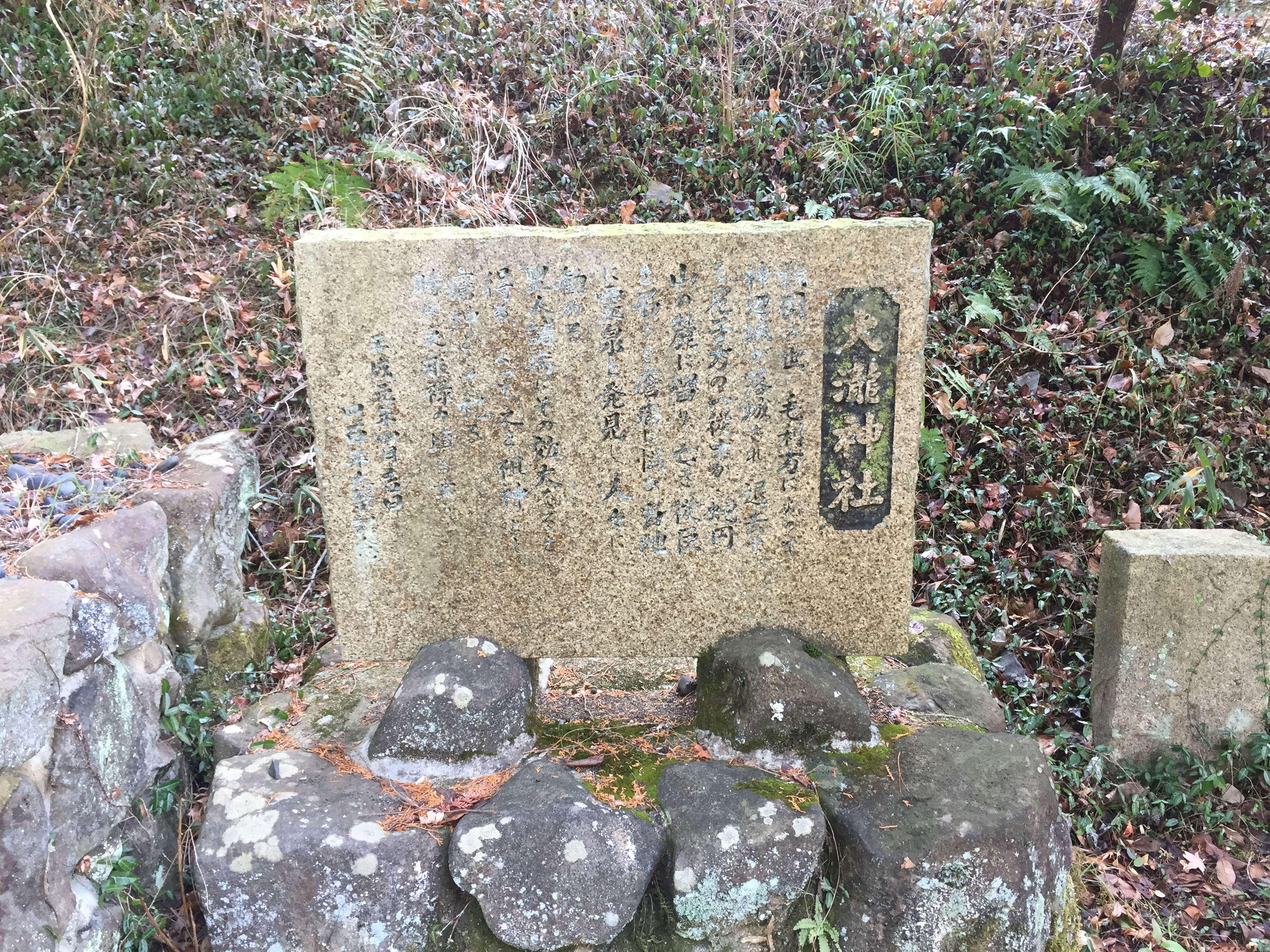 大滝神社の起こりが記録された石碑